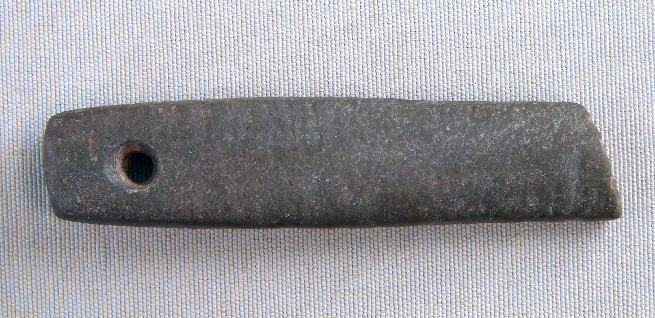 Pierre à aiguiser. Fait partie du matériel d'une tombe masculine (la tombe I) à Monceau-le-Neuf dans l'Aisne. Epoque gallo-romaine, 400 + JC. Musée de Laon.